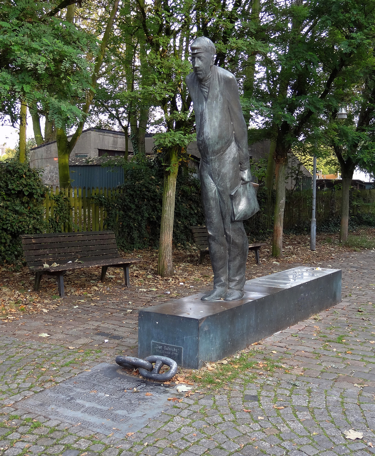 Skulptur "Zur Schicht" von Waldemar Otto nahe der Keuzung von Lindenhofstraße und Dockstraße in Bremen-Gröpelingen.